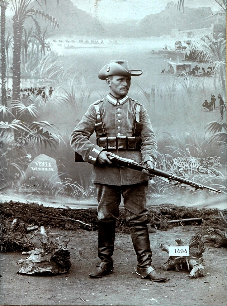 Fotografie eines Schutztruppenangehörigen vor der Verschifffung ins Einsatzgebiet im Jahr 1904